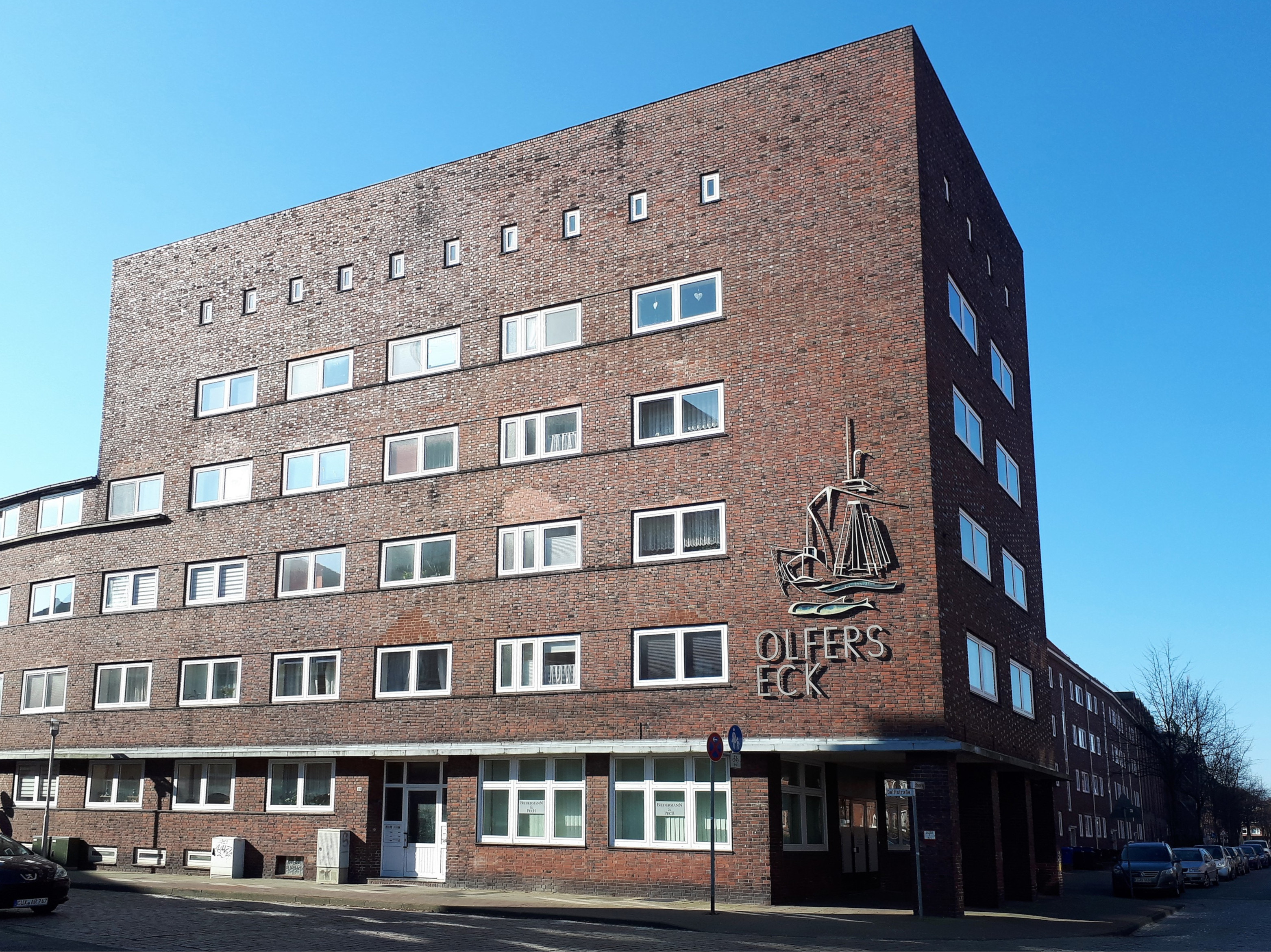 Haus Olfers Eck Architekt: P. H. Noris Bauherr: Bauhütte Cuxhaven